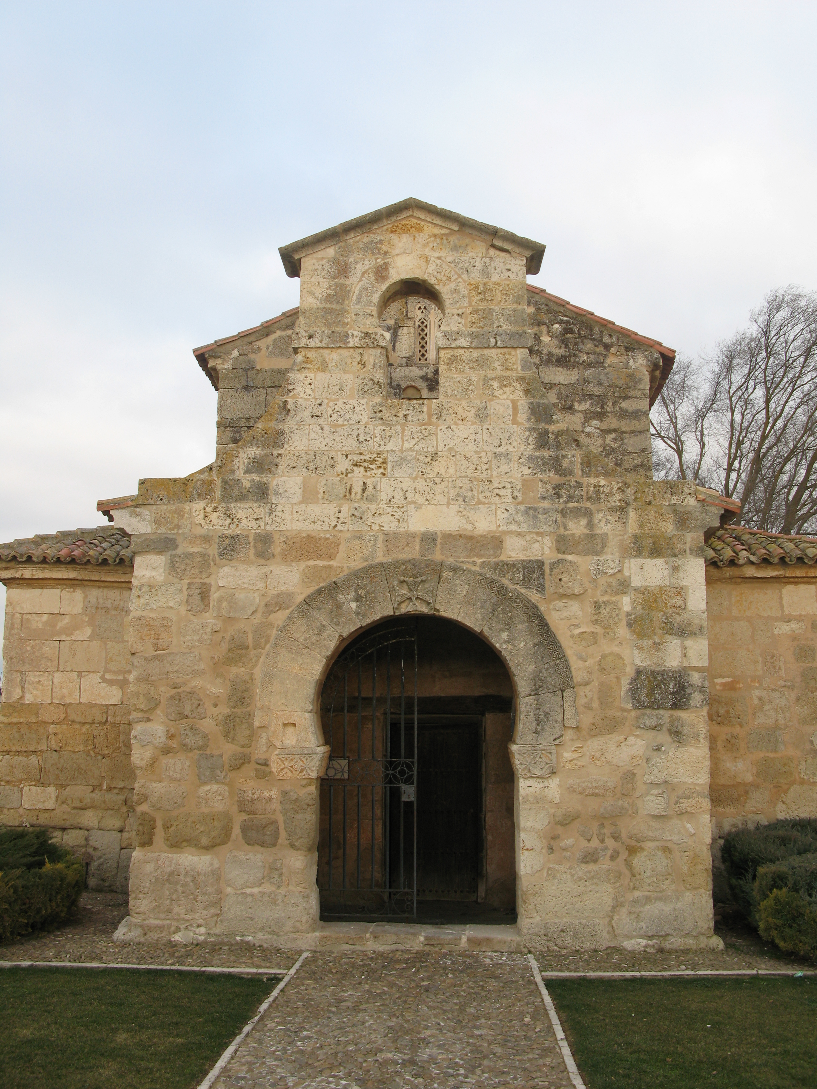 Iglesia de San Juan de Baños, en Baños de Cerrato, municipio de Venta de Baños, provincia de Palencia, Comunidad de Castilla y León, España.